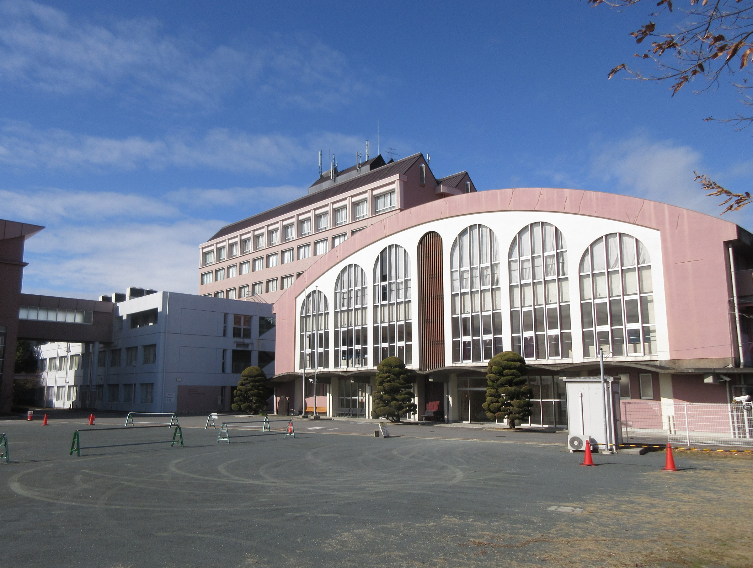 岡崎女子大学（岡崎市中町）